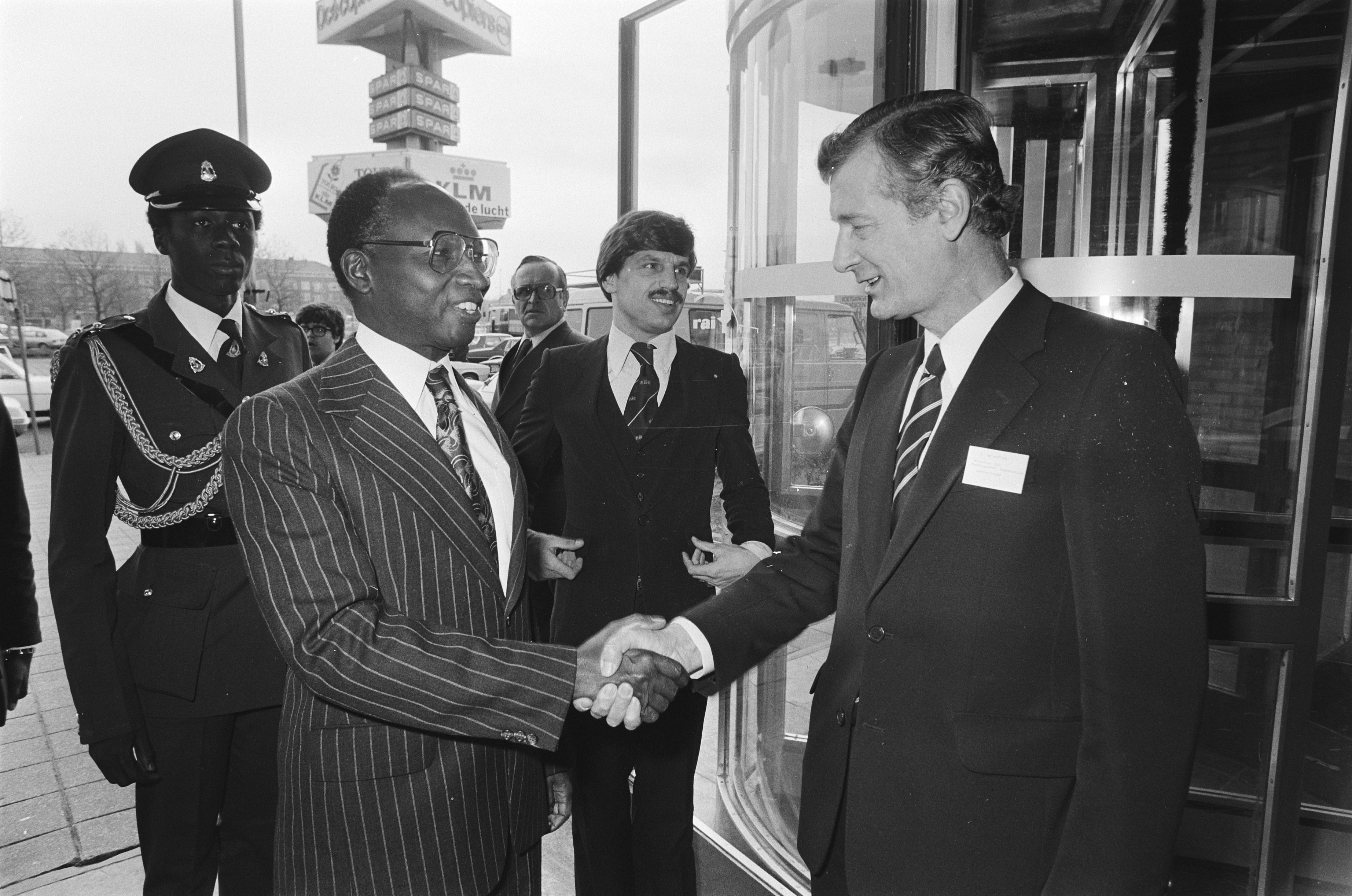 Collectie / Archief : Fotocollectie Anefo Reportage / Serie : [ onbekend ] Beschrijving : Congres club de Sahel in Amsterdam; minister De Koning begroet president Jewara van Gambia Datum : 21 november 1978 Locatie : Amsterdam, Gambia Trefwoorden : congressen, ministers, presidenten Persoonsnaam : Gambia, Koning, Jan de Fotograaf : Suyk, Koen / Anefo Auteursrechthebbende : Nationaal Archief Materiaalsoort : Negatief (zwart/wit) Nummer archiefinventaris : bekijk toegang 2.24.01.05 Bestanddeelnummer : 930-0076